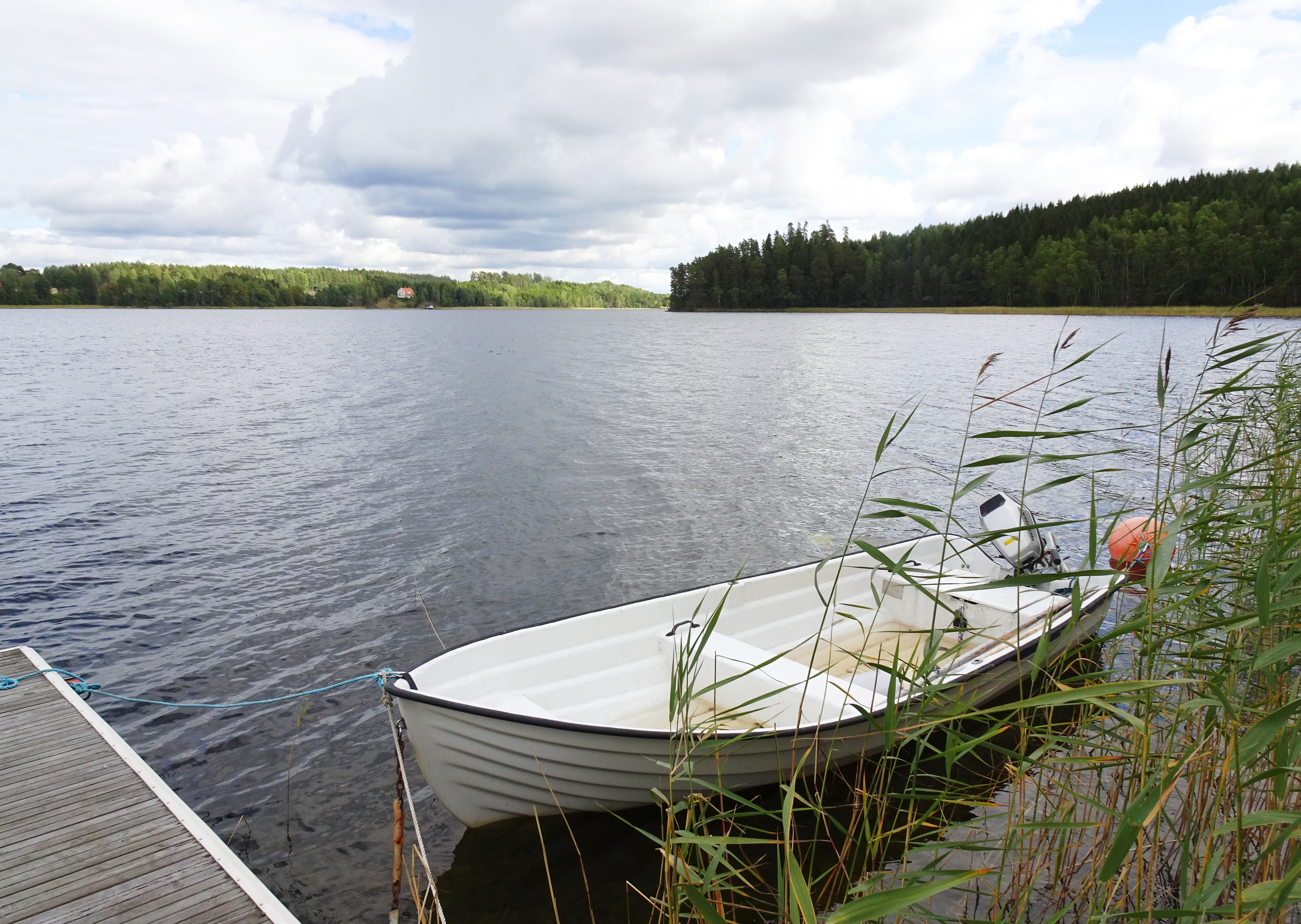 Sjön Misteln från sydväst